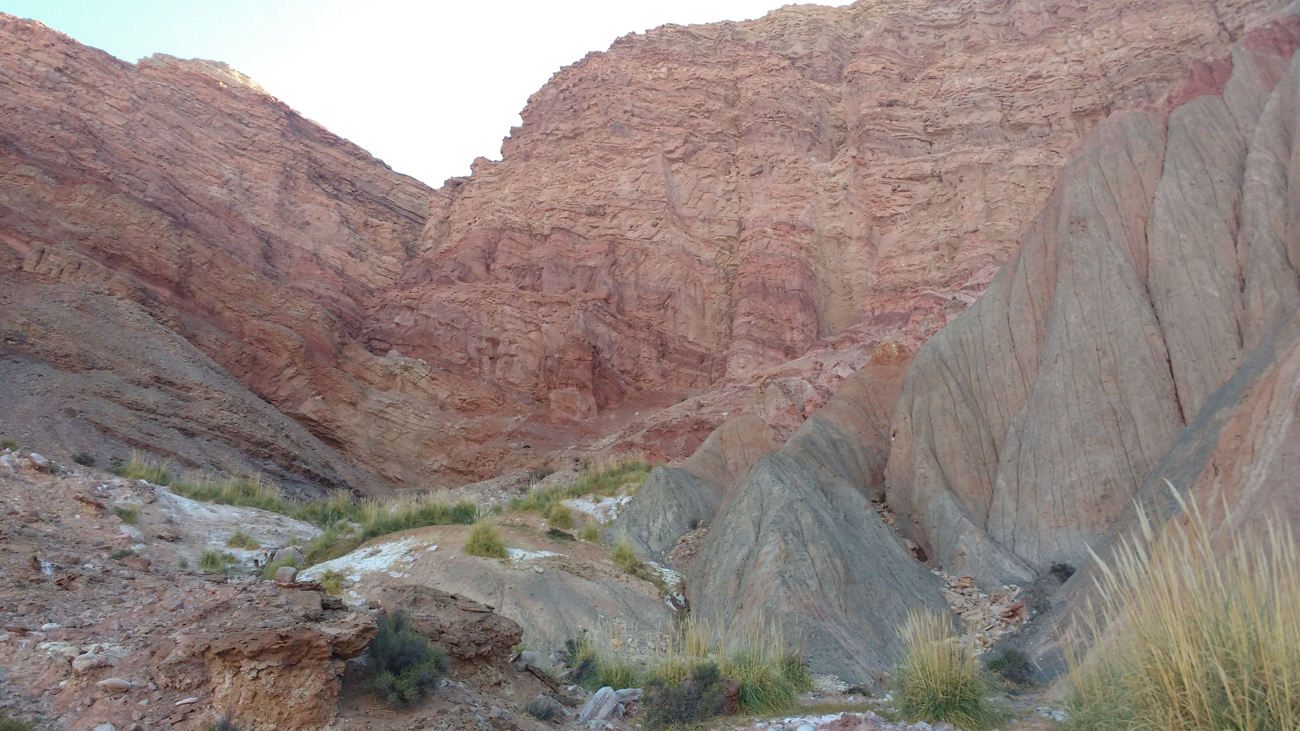 Monumento natural. Cerros coloridos en Ingeniero Maury